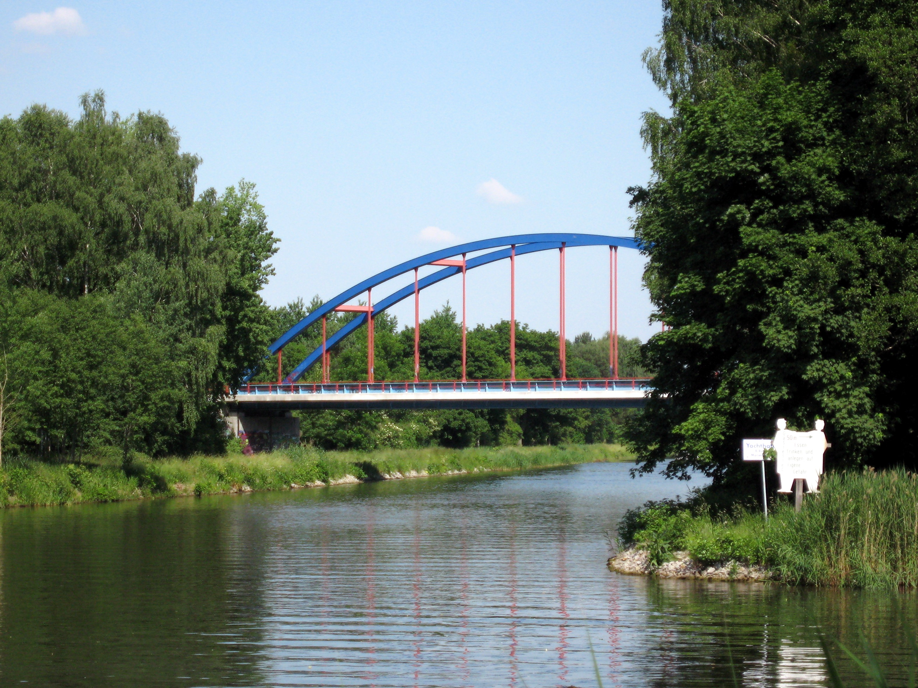 Brücke der Niederbarnimer Eisenbahn über den Oder-Havel-Kanal bei Zerpenschleuse, Gemeinde Wandlitz, Landkreis Barnim, Land Brandenburg, Deutschland